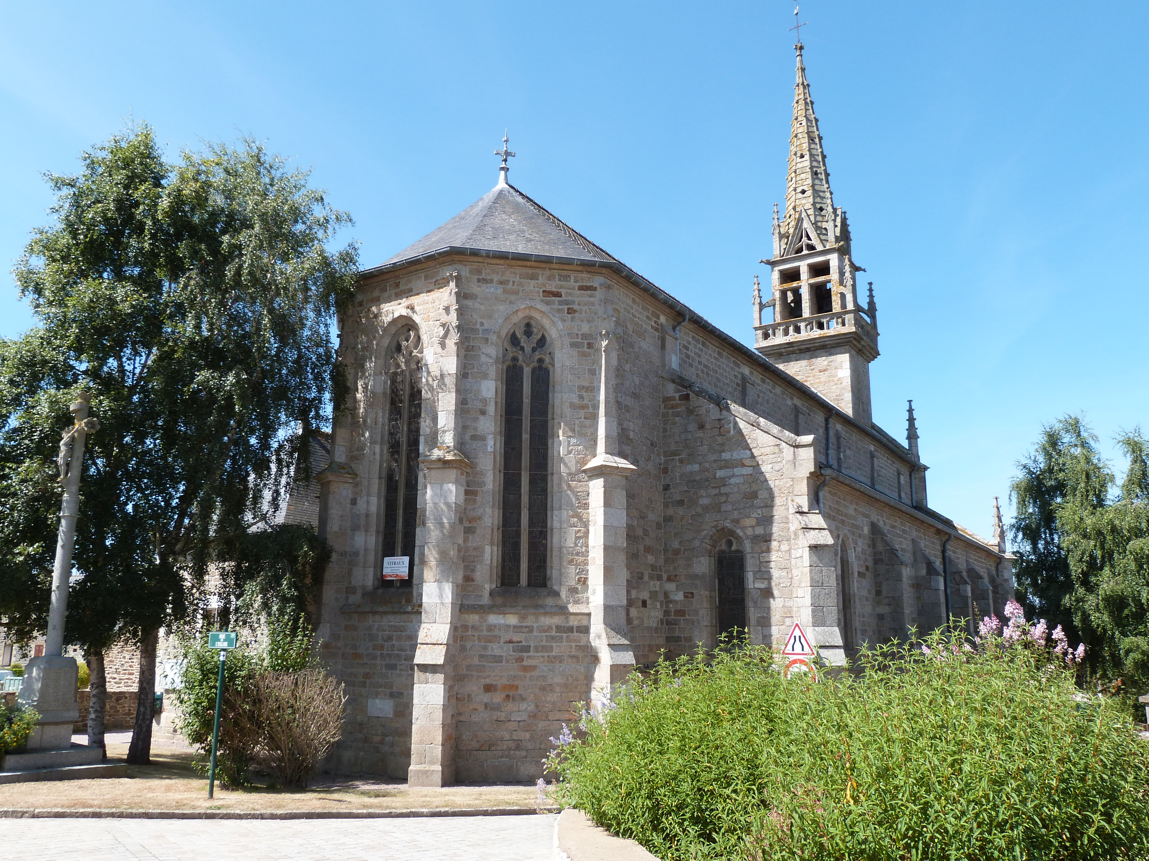 Chevet de l'église Saint-Jean-Baptiste de Coëtmieux